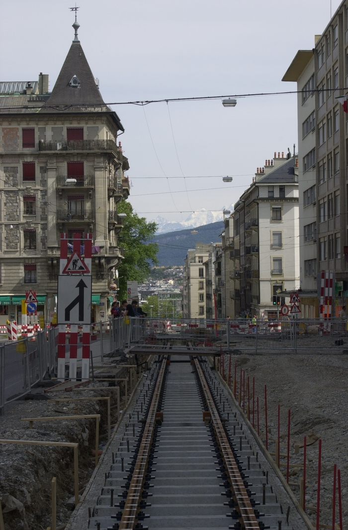 Rue de la Servette - pendant les travaux destinés à l'aménagement des voies du tram